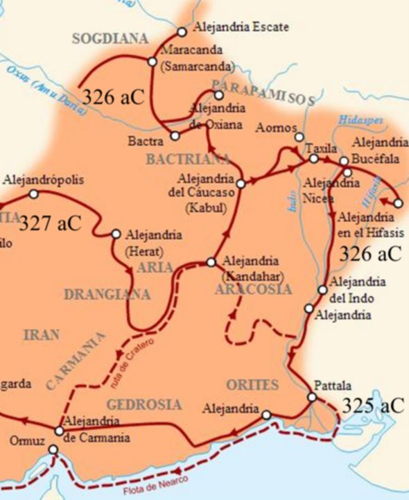 Mapa Zoom sobre la 4º etapa de las conquistas de Alejandro Magno, India. Alexander The Great battles and campaigns, rutes.